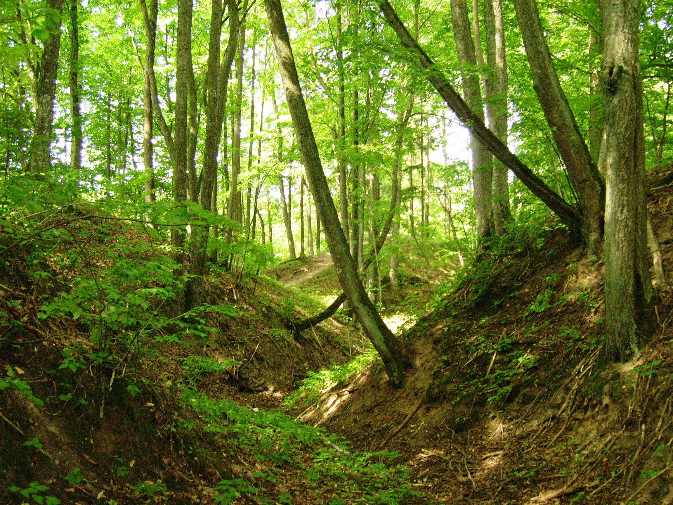 Kiukiškių piliakalnis